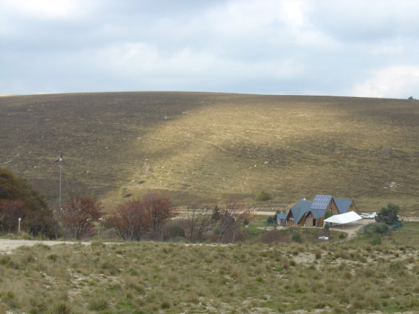 Le col des Supeyres (1366m)